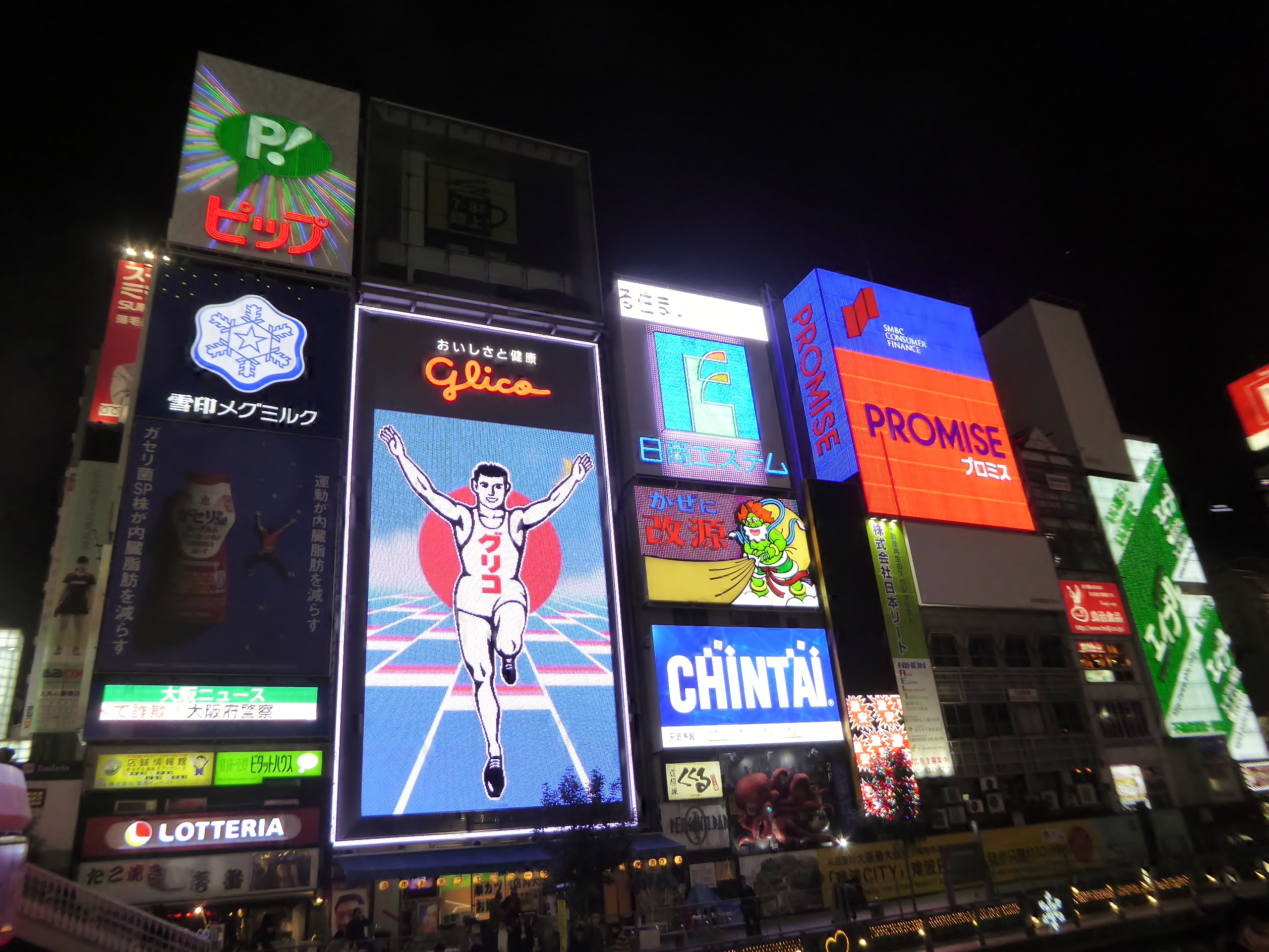 2017年1月21日夜時点の道頓堀サイン群を撮影。